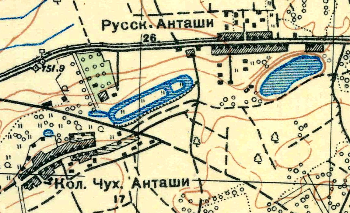 Топографическая карта Ленинградской области, квадрат О-35-24-А-а (Клясина), деревня Анташи